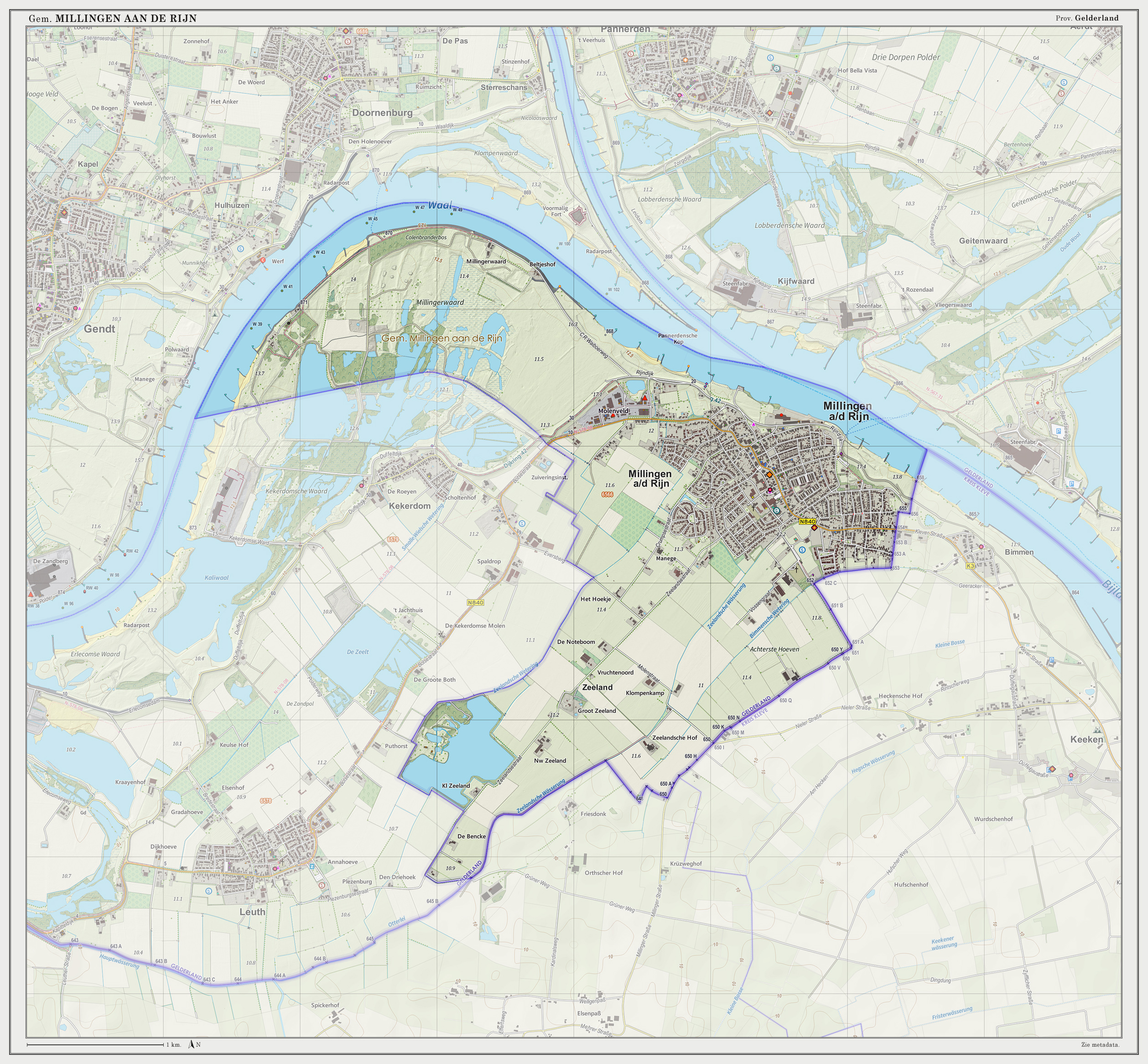 Topografische gemeentekaart per september 2014. Resolutie: 300 pixels/km. Kaartbeeld samengesteld uit de open geodata van de Top10NL en Top25namen (Kadaster, 30-sep-2014), Creative Commons-BY licentie. Gebouwvlakken uit open geodata BAG extract (8-sep-2014). Wegen uit de OpenStreetMap (15-sep-2014), OpenStreetMap community. Reliëfschaduw uit de Actuele Hoogtekaart AHN2 (8-mrt-2014). Samenstelling en kleurenschema: Jan-Willem van Aalst, met QGIS. Zie ook de Legenda.